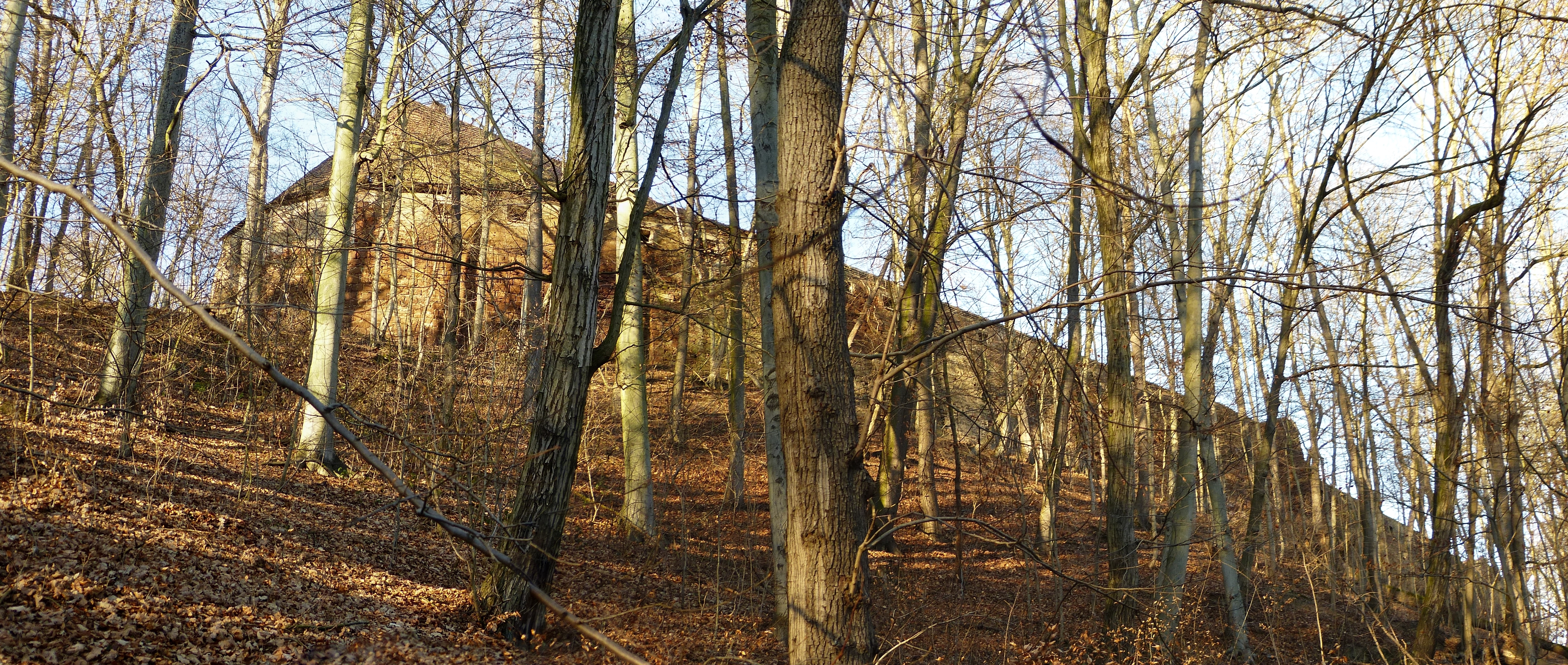 Ansicht des Schlosses nach Rückbau zur Verkehrssicherung der Bundesstraße 175